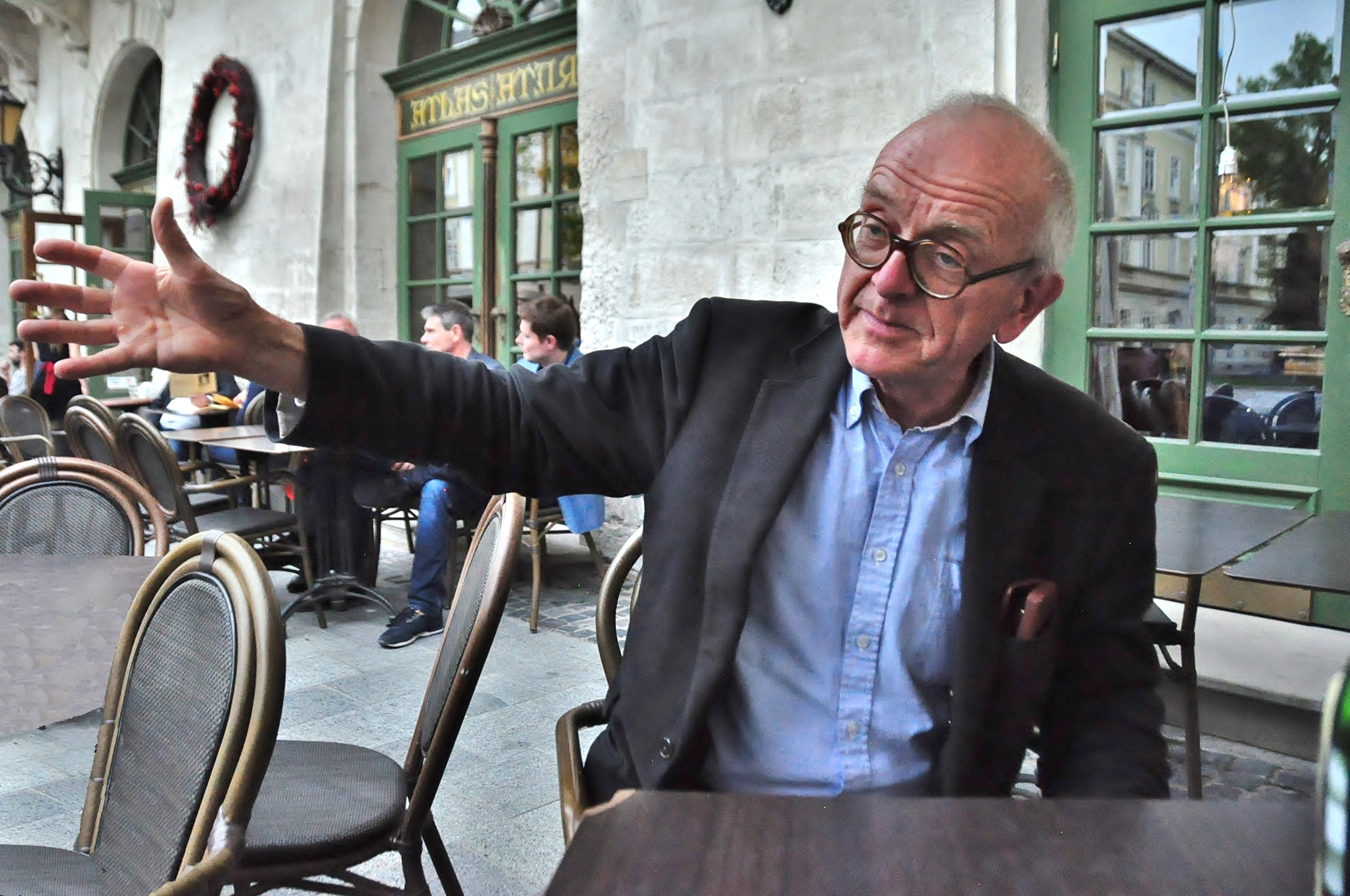 British neurosurgeon Henry Marsh in Lviv, Ukraine on April 28, 2017